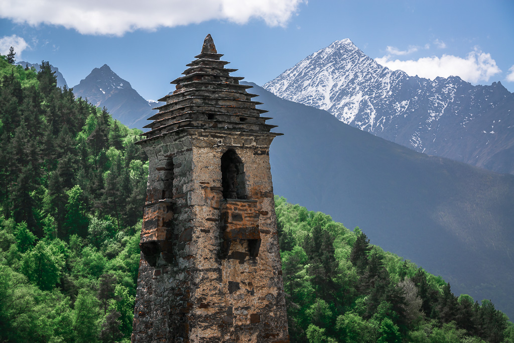 Башня в древнем ингушском городе-поселении Хяни (Джейрахский район, Ингушетия)